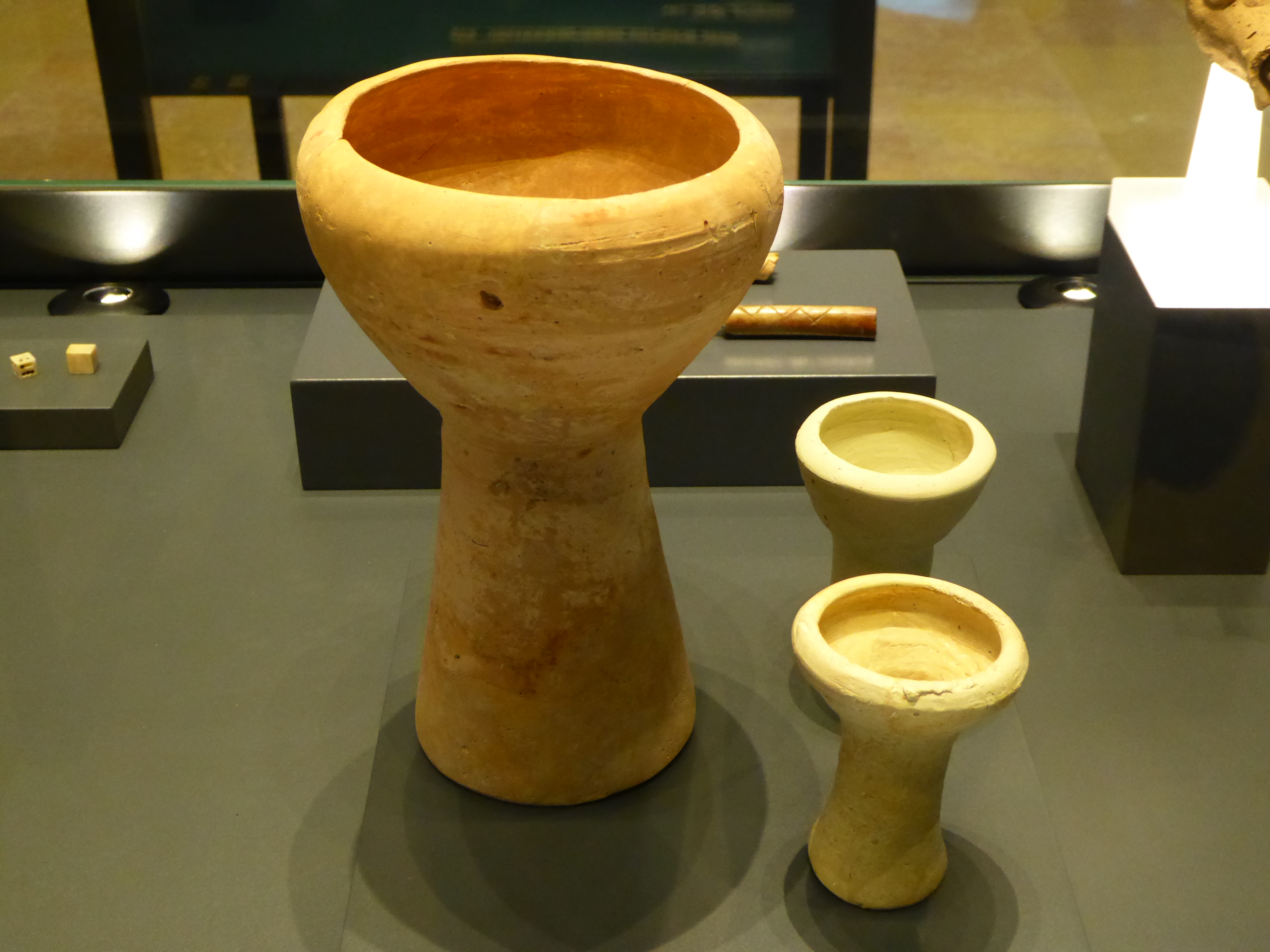 Darabukkas o pequeños tambores en el Museo del Teatro romano de Caesaraugusta (Zaragoza). Piezas de cerámica del siglo XI de los talleres de Zaragoza.